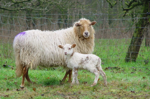 Drents Heideschaap Categorie:Afbeelding dier